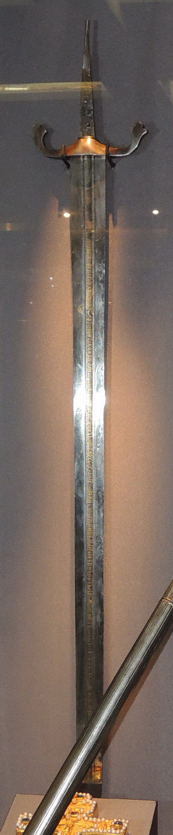 3. Палаш. Россия. 17 век. Сталь, золотая всечка, дерево, кожа. По полотну клинка надпись: «ПОЛАШЪ ИВАНА ВАСИЛЬЕВИЧА [И]ЗМАЙЛОВА…». ГИМ. Иван Васильевич Меньшой Измайлов (ум. ок. 1630) – с воцарением Лжедмитрия I оказался в его ближайшем окружении. После смерти самозванца – стольник Василия Шуйского. После свержения его – был окружным оружничим при «дворе» королевича Владислава. В 1612 году участвовал в Втором ополчении. Надпись на палаше, возможно, была сделана в период, когда Измайлов в чине оружничего отвечал за царскую оружейную казну, а также за изготовление и закупку оружия.